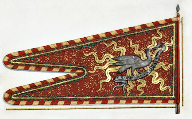 Il vessillo di Massimiliano Sforza, conte di Pavia e poi duca di Milano, catturato dagli svizzeri verso il 1512, in un'incisione colorita del 1649 (l'esemplare ritratto, già conservato a Friburgo, è andato perduto).